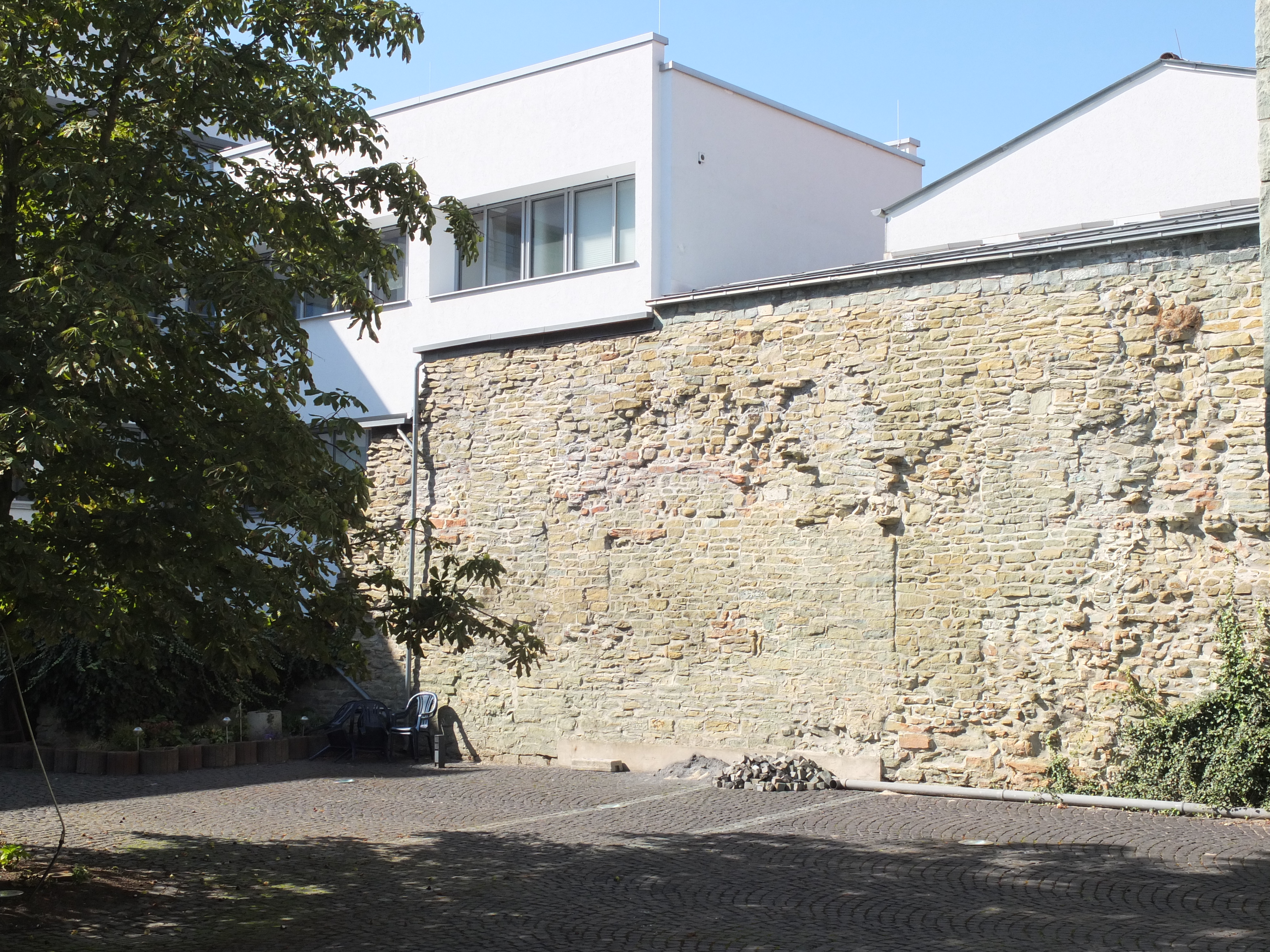 „Wittekindsmauer“ des Hohen Hospitals in SoestThis is a photograph of an architectural monument.It is on the list of cultural monuments of Soest